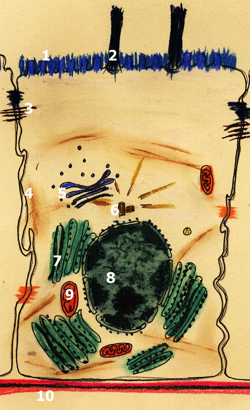 Šematizovana epitelska ćelija sa uočljivom polarnošću, naleže na podepitelsku laminu (Epithelial cell)